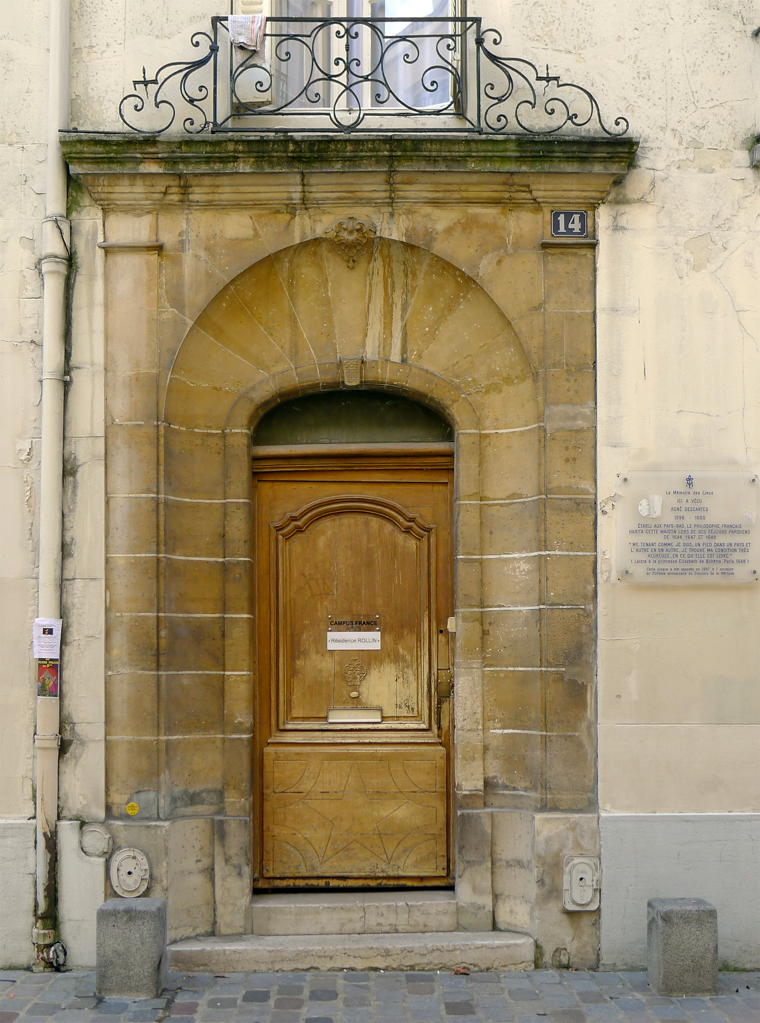 Rue Rollin (n° 14) - Paris V